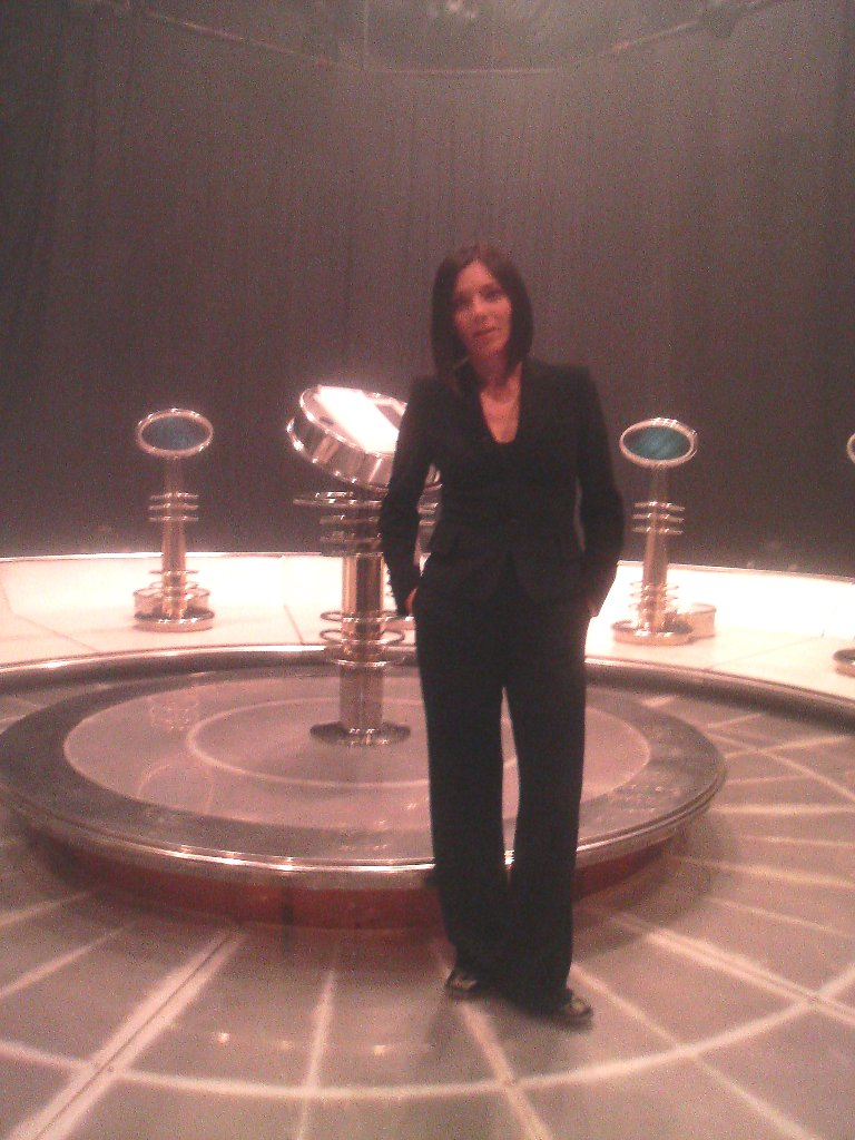 Daniela Trbovic